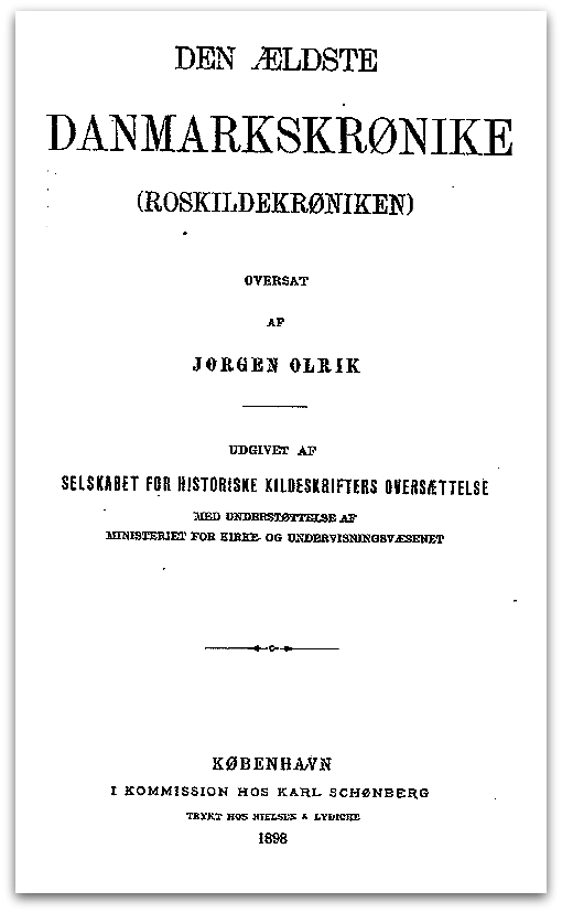 Kronika z Roskilde, wydanie tłumaczenia duńskiego z 1898 r.